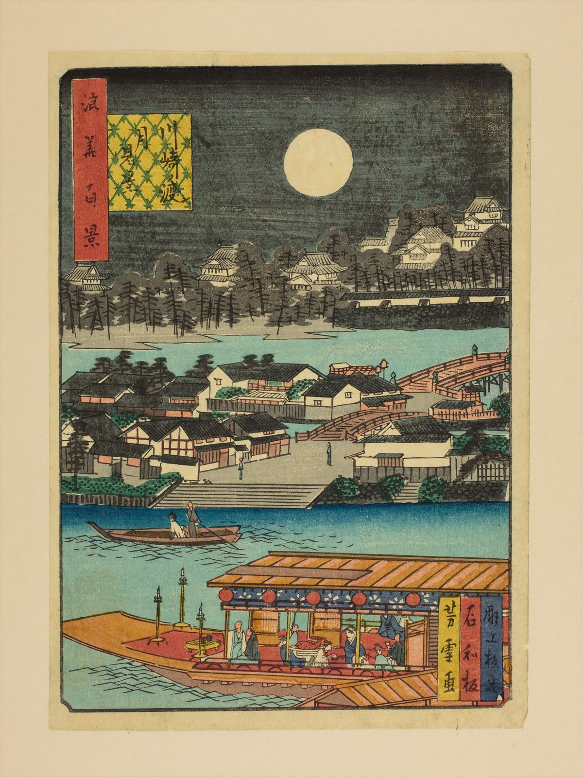 1800年代。南粋亭芳雪/画。浪花百景 102枚のうちの1枚。大阪市立中央図書館蔵。